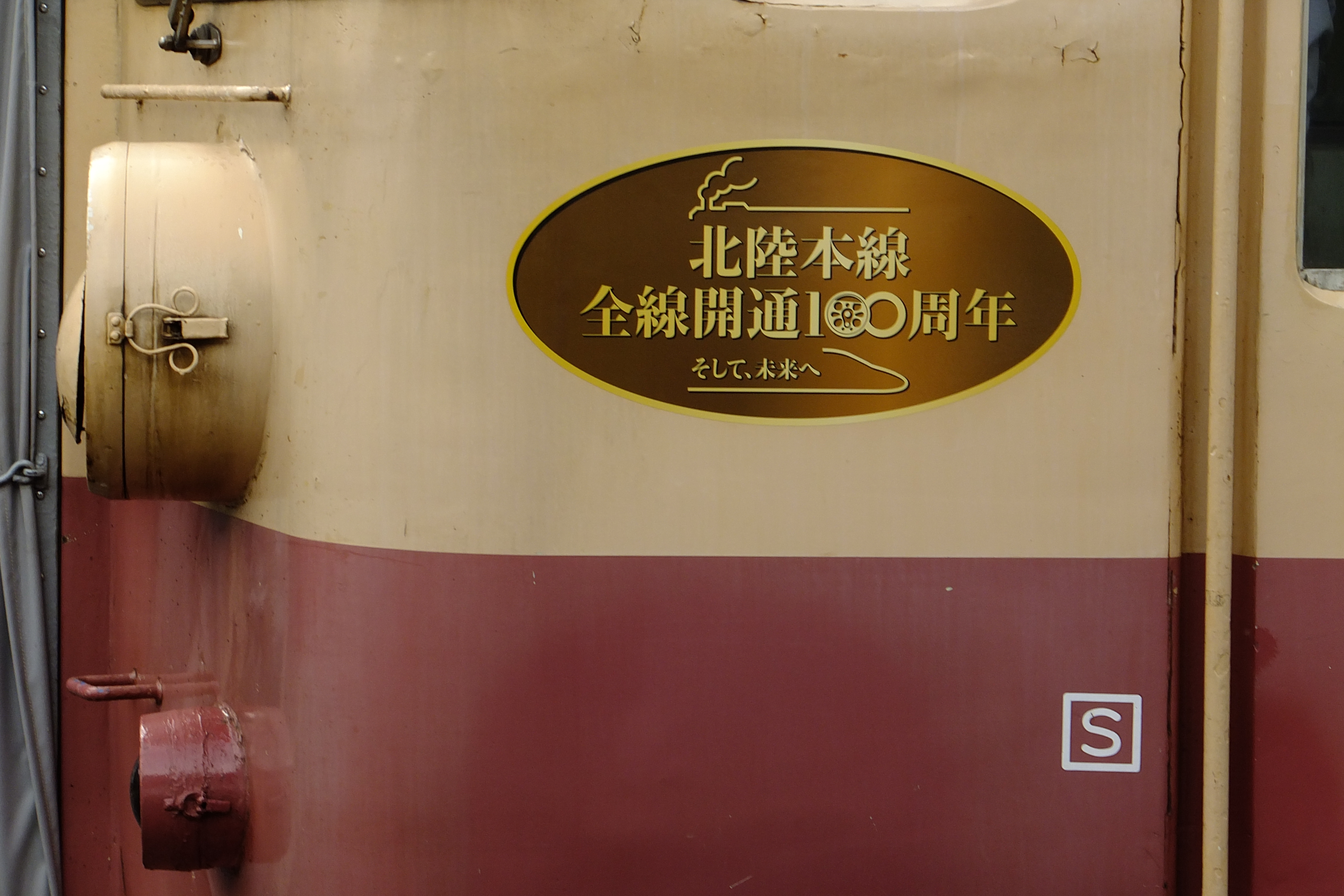 クハ455-60に貼られているJR西日本/北陸本線、米原－直江津、全線開業100周年記念エンブレム。（直江津にて）